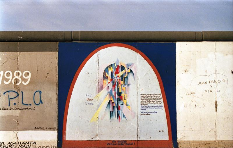 25.7.1991 "East-Side-Gallery", gelegen zwischen der Jannowitzbrücke und der Oberbaumbrücke. Reste der Berliner Mauer, die nach der Öffnung von vorwiegend ostdeutschen Künstlern auf der Ost-Seite bemalt wurden.